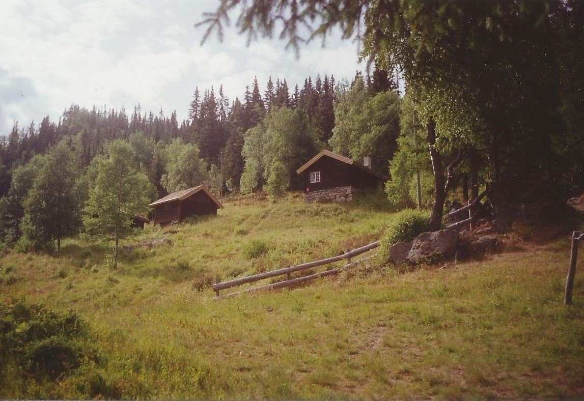 Sondre Norheims fødested, Øvrebø i Morgedal